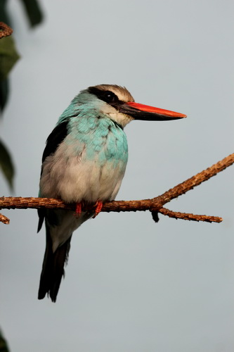 Синегрудая альциона (Halcyon malimbica), Денверский зоопарк (Denver zoo)